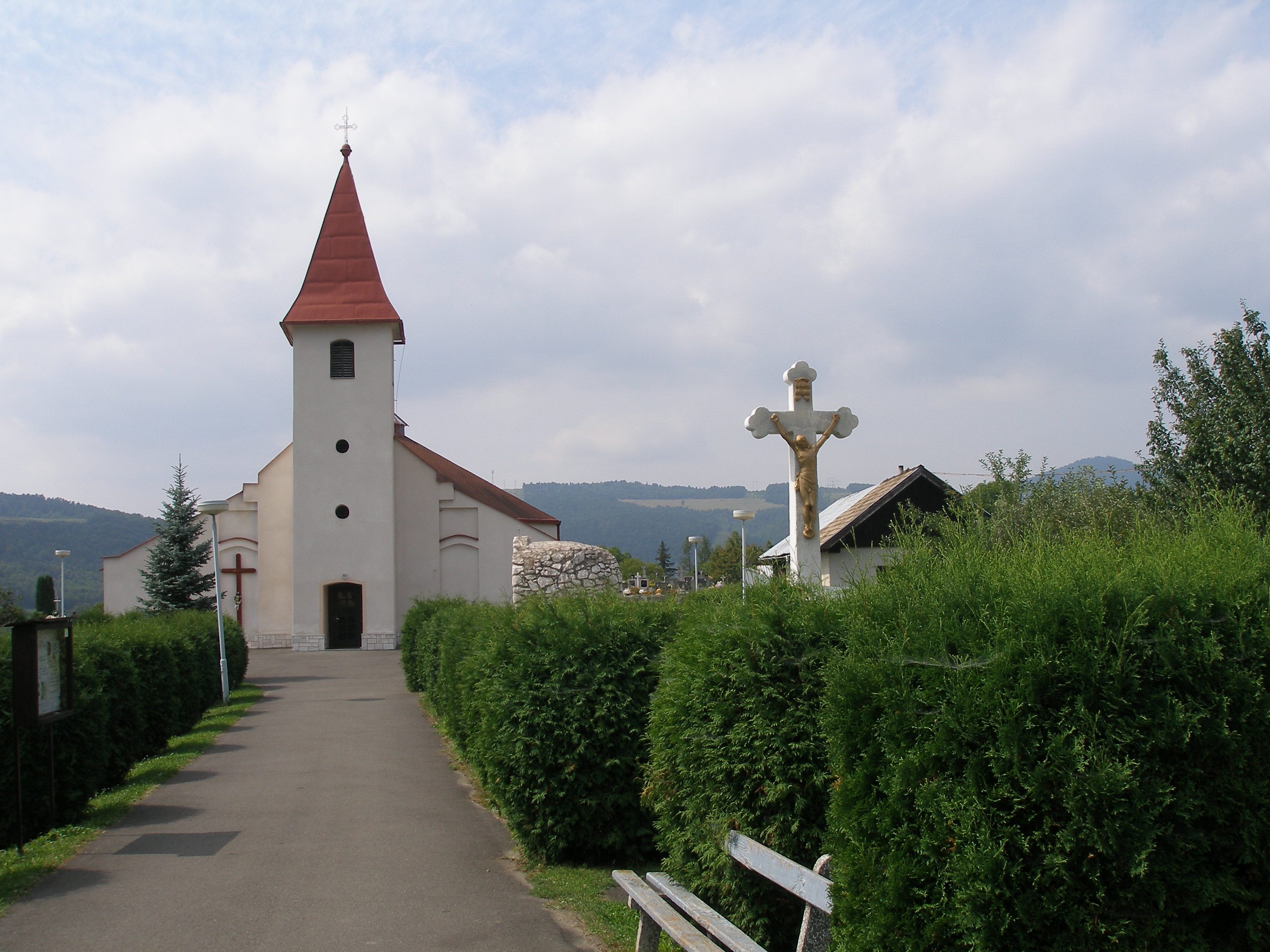 Šarišská obec Ovčie okres Prešov.